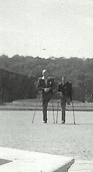 Zwei Kriegsopfer auf Krücken vor Schloss Schönbrunn, auf Seite Gloriette.